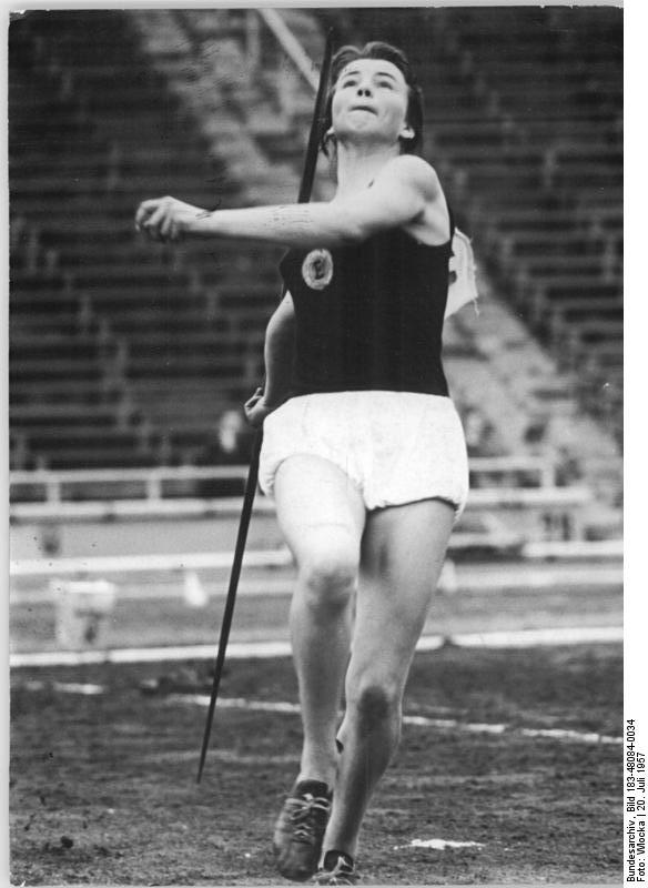 Leipzig, Turn- und Sporttreffen, Speerwurf Zentralbild Wlocka Noa 20.7.1957 Turn- und Sporttreffen der Jugend in Leipzig. Im Rahmen des Turn- und Sporttreffen der Jugend wurden am Sonnabend, dem 20. Juli, die deutschen Meisterschaften in Leichtathletik fortgesetzt. UBz: Im Speerwerfen der weiblichen Jugend Klasse A wurde deutsche Meisterin mit 42,22 m Thimann (Einheit Brandenburg).